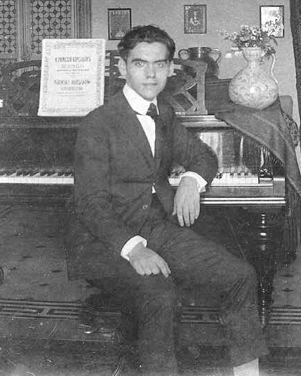 Federico García Lorca al piano en Granada.